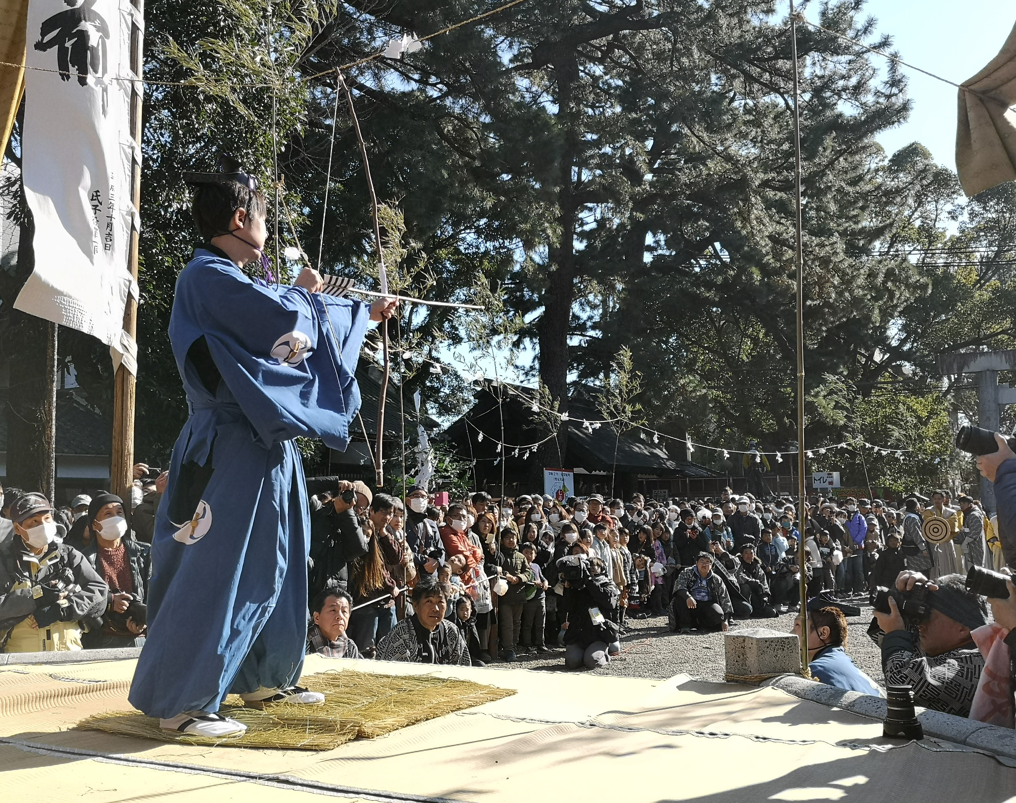 愛知県豊橋市の安久美神戸神明社の例祭「鬼祭」における御的神事